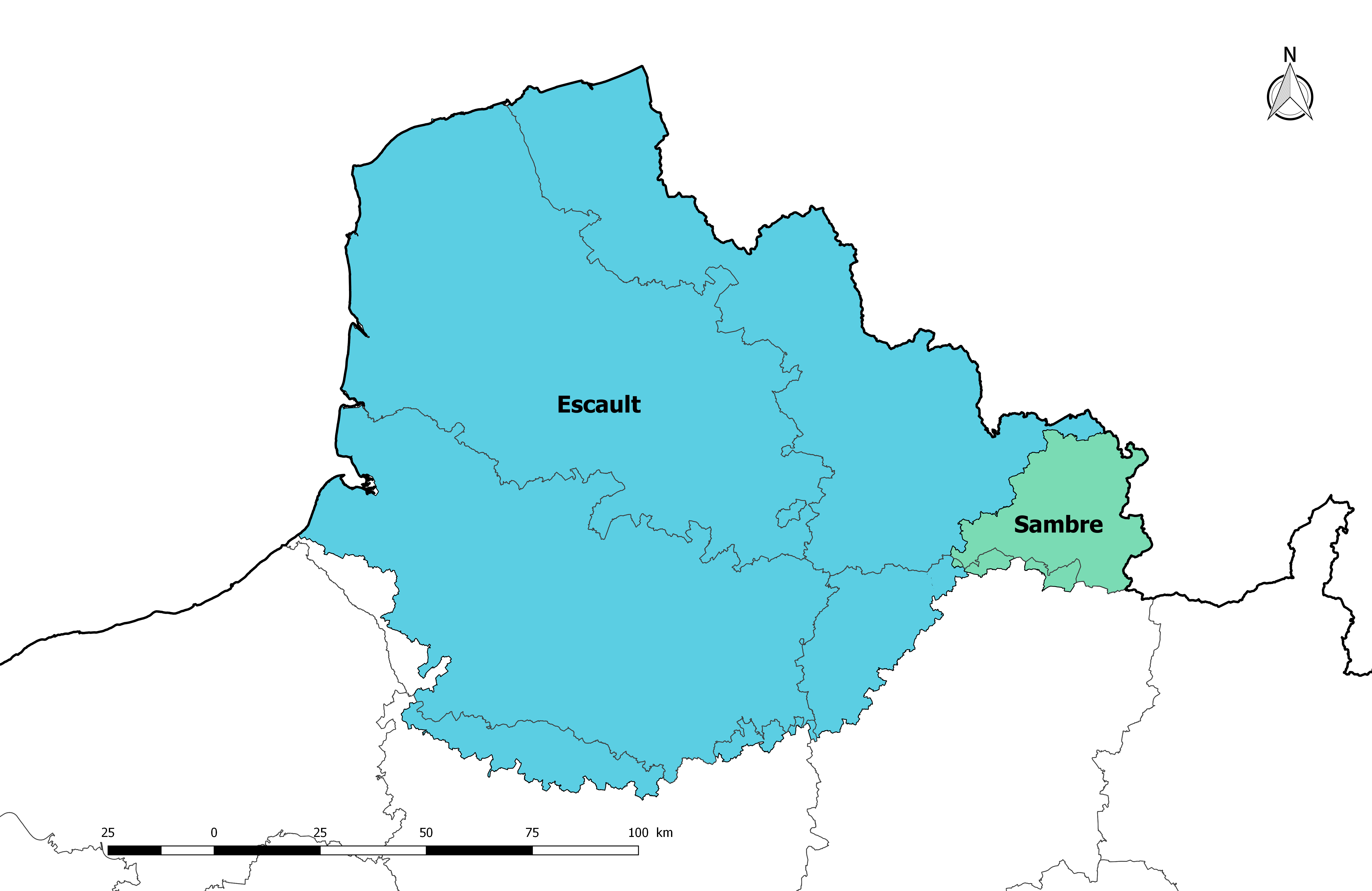 Carte de la circonscription de bassin Artois-Picardie en France, avec les sous-bassins qui la composent.